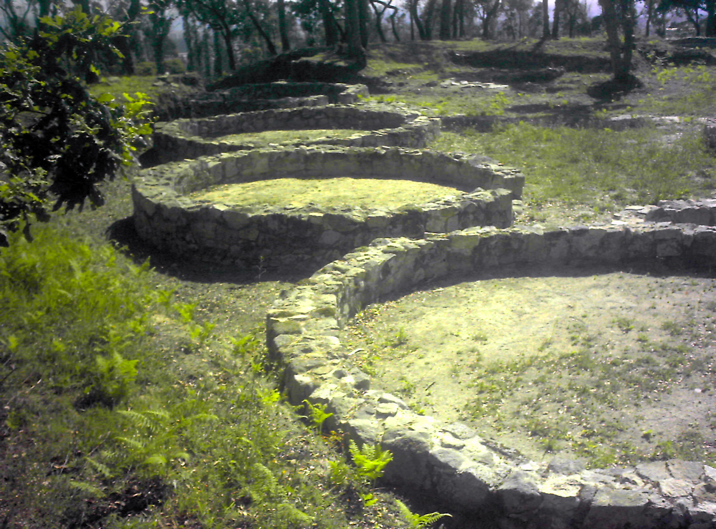 Cividade de Terroso photographer: PedroPVZ Taken: June 1st, 2006 Tirada a: 1 de Junho de 2006